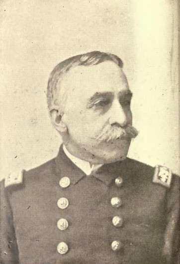 Admniral George Dewey